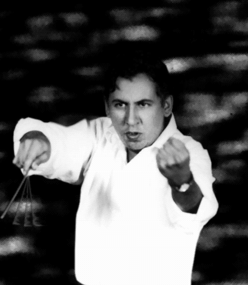 Capturada en el año 2000, Alfonso Mejía-Arias al frente de la Orquesta Sinfónica Centroamericana, en la Ciudad de Panamá